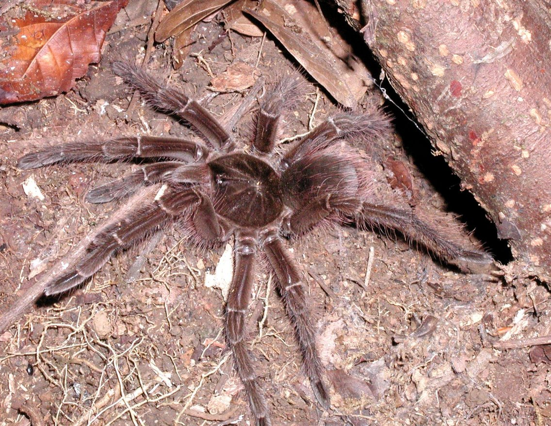 Theraphosa leblondi en forêt guyanaise